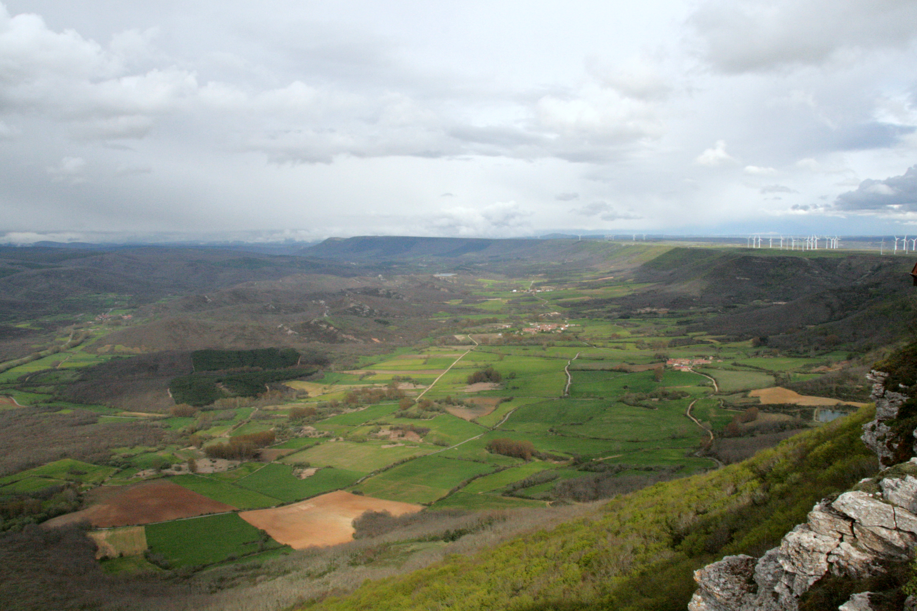 Vista del Valle de Valderredible (Cantabria) desde el mirador de Valcabado This is a photography of a Site of Community Importance in Spain with the ID: ES1300013. Natura2000 entry, EEA entry